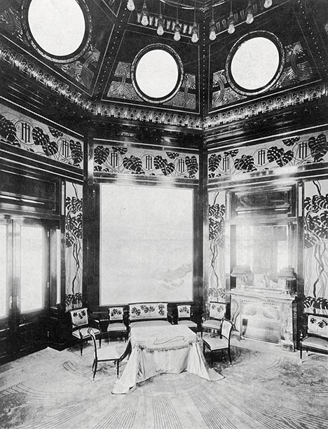 Otto Wagner Stadtbahn, Hofpavillion in Hietzing, Wartesaal des Kaisers, Ausführung: Portois & Fix